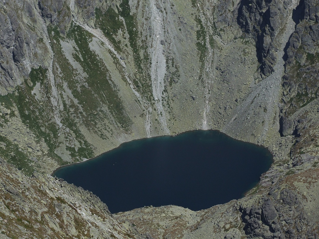 Niżni Teriański Staw (Nižné Terianske pleso). Widok z Krywania